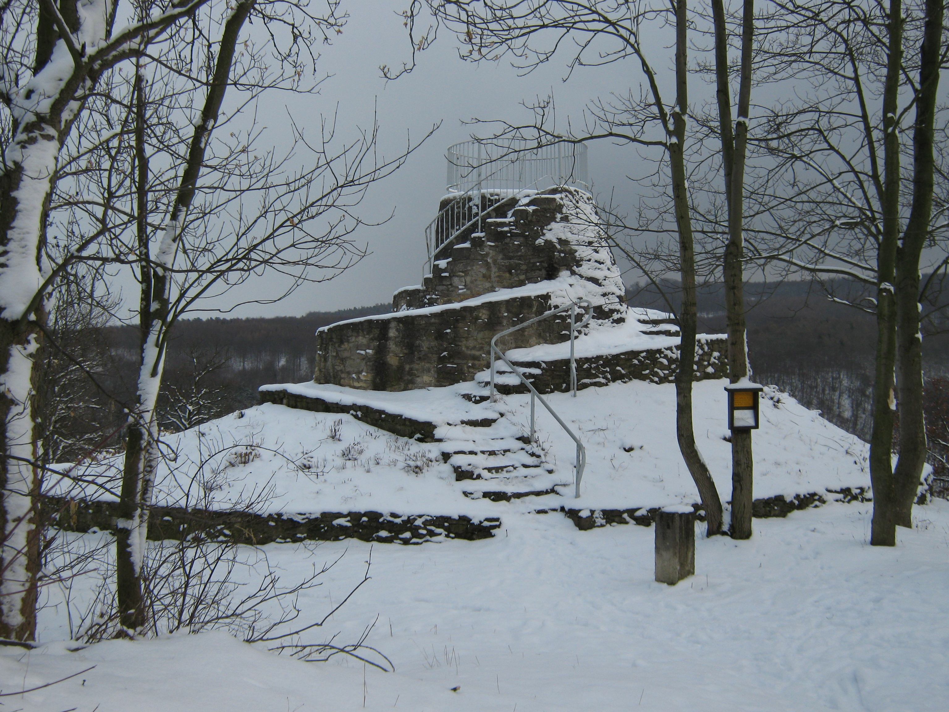 Belvida turo Schneckchen en Arnstadt (Germanio).